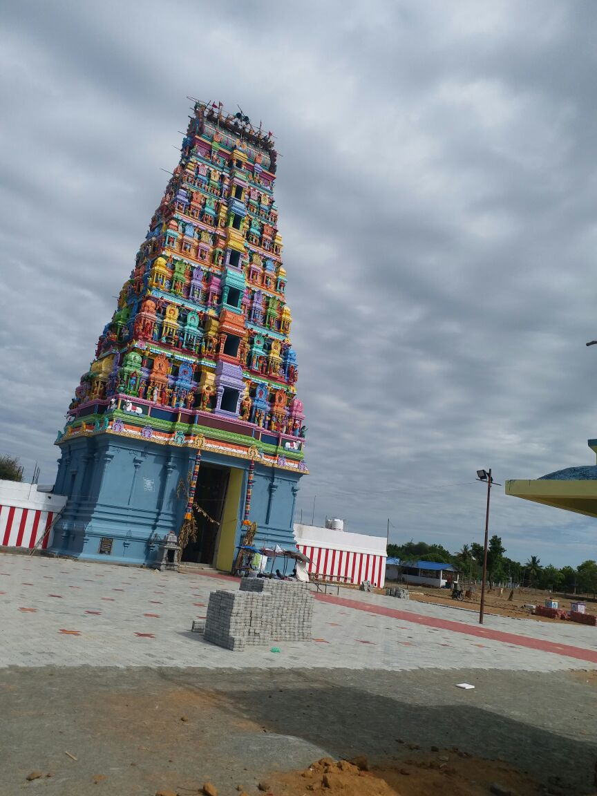 தென் திருவண்ணாமலை கோவில்